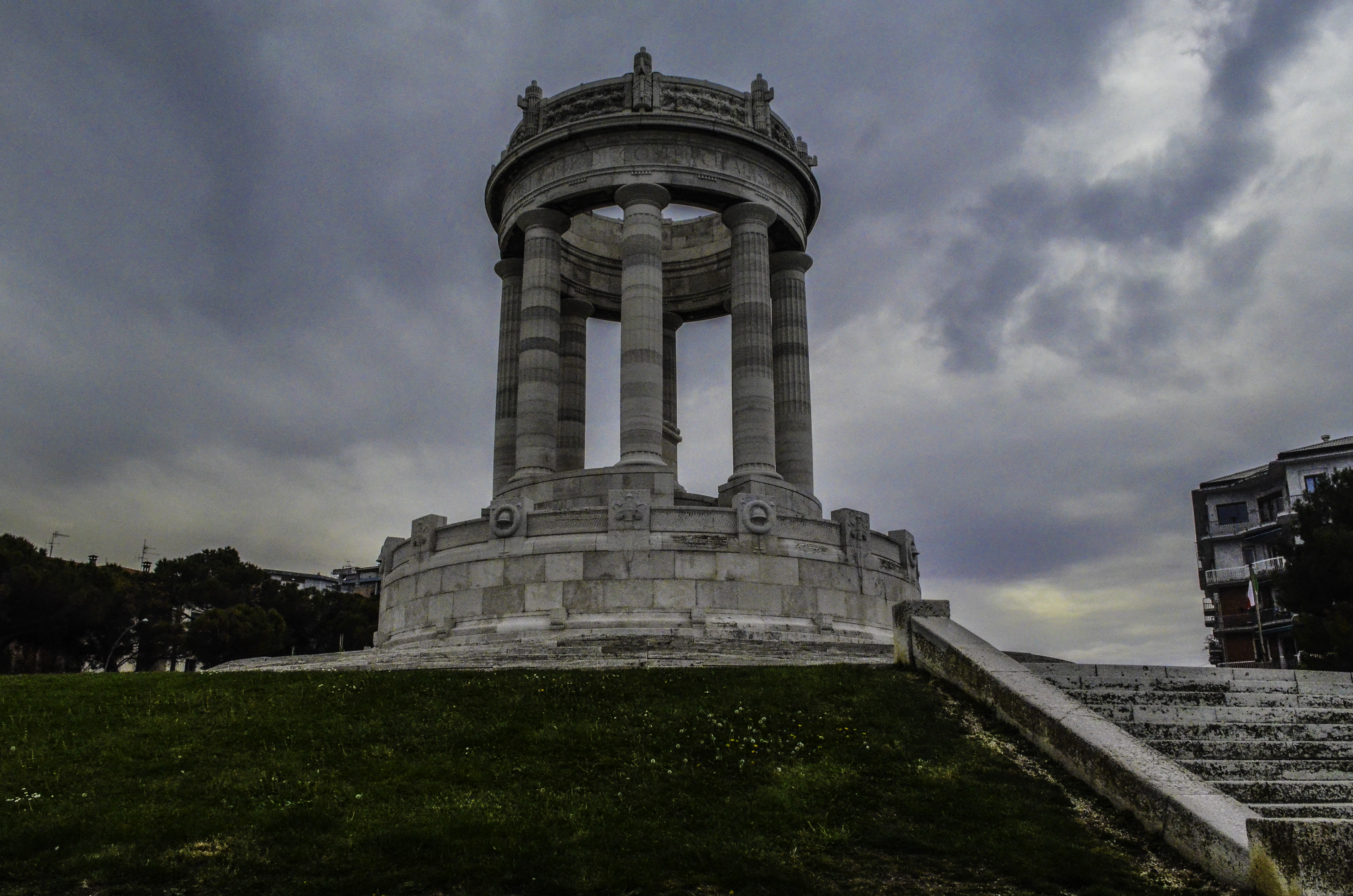 Monumento ai Caduti This is a photo of a monument which is part of cultural heritage of Italy.